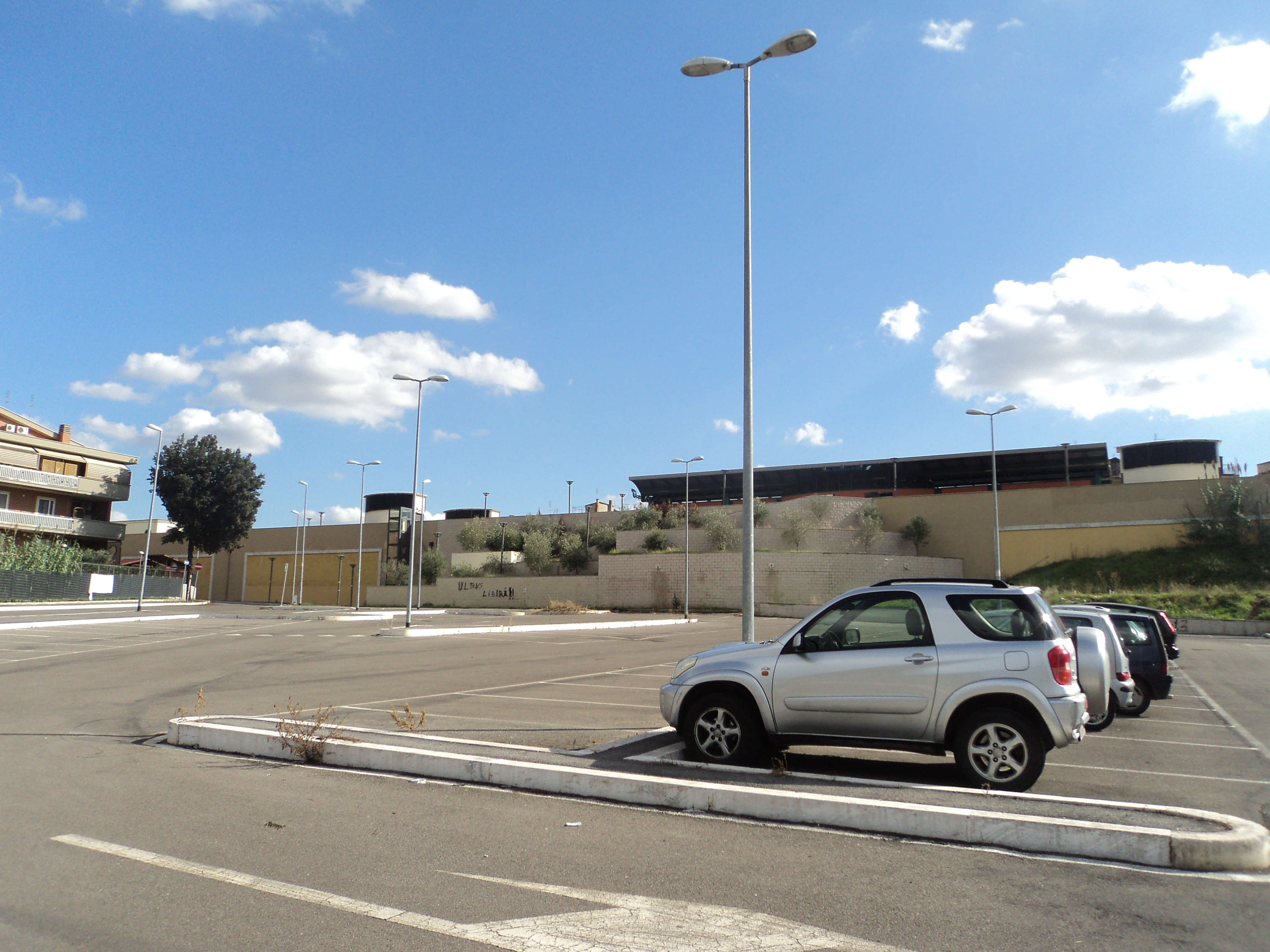 Il parcheggio di Via Sileno, con la stazione "La Rustica Città" sullo sfondo. Per altre foto